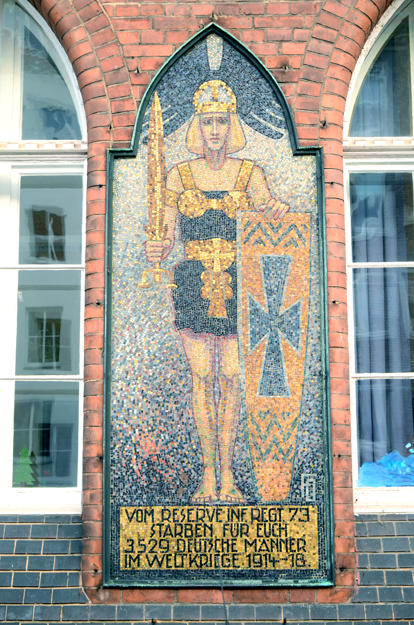 Am 18. September 1930 während einer Feierlichkeit enthülltes Mosaik an der Außenmauer der Anfang des 21. Jahrhunderts als Grundschule Kestnerstraße (Kestnerstraße 38–39) in der Südstadt von Hannover. Mehrere Tausend von einem Metallrahmen eingefasste, gebrannte und farbig bemalte Mosaikplättchen, viele davon mit Blattgold, bilden einen mittelalterlich wirkenden Roland mit dem in die Höhe gehaltenen Schwert. Das vormalige Sinnbild städtischer Autonomie diente hier an dem ehemals als Schulkaserne genutzten Gebäude als Gedenktafel für die Gefallenen des Reserve-Infanterie-Regiments Nr. 73. Laut der ebenfalls aus Mosaikplättchen gebildeten Inschrift „(...) STARBEN FÜR EUCH 3529 DEUTSCHE MÄNNER im WELTKRIEGE 1914–18.“ Rechts oberhalb der Inschrift ist die Künstlersignatur F O des hannoverschen Malers und Künstlers Ferdinand Osten (1878–?) zu sehen ...